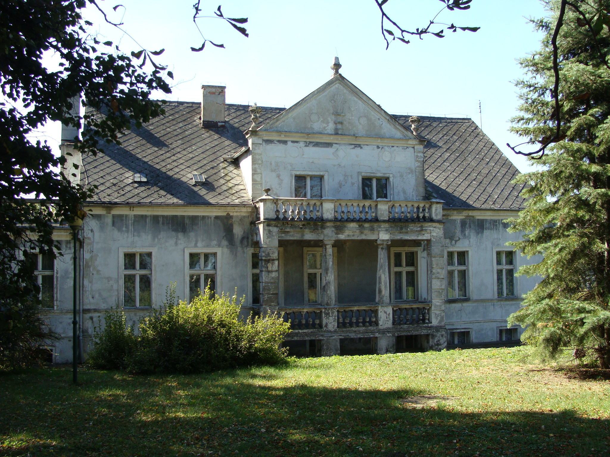 Brzyskorzystewko, dwór, ok. 1873